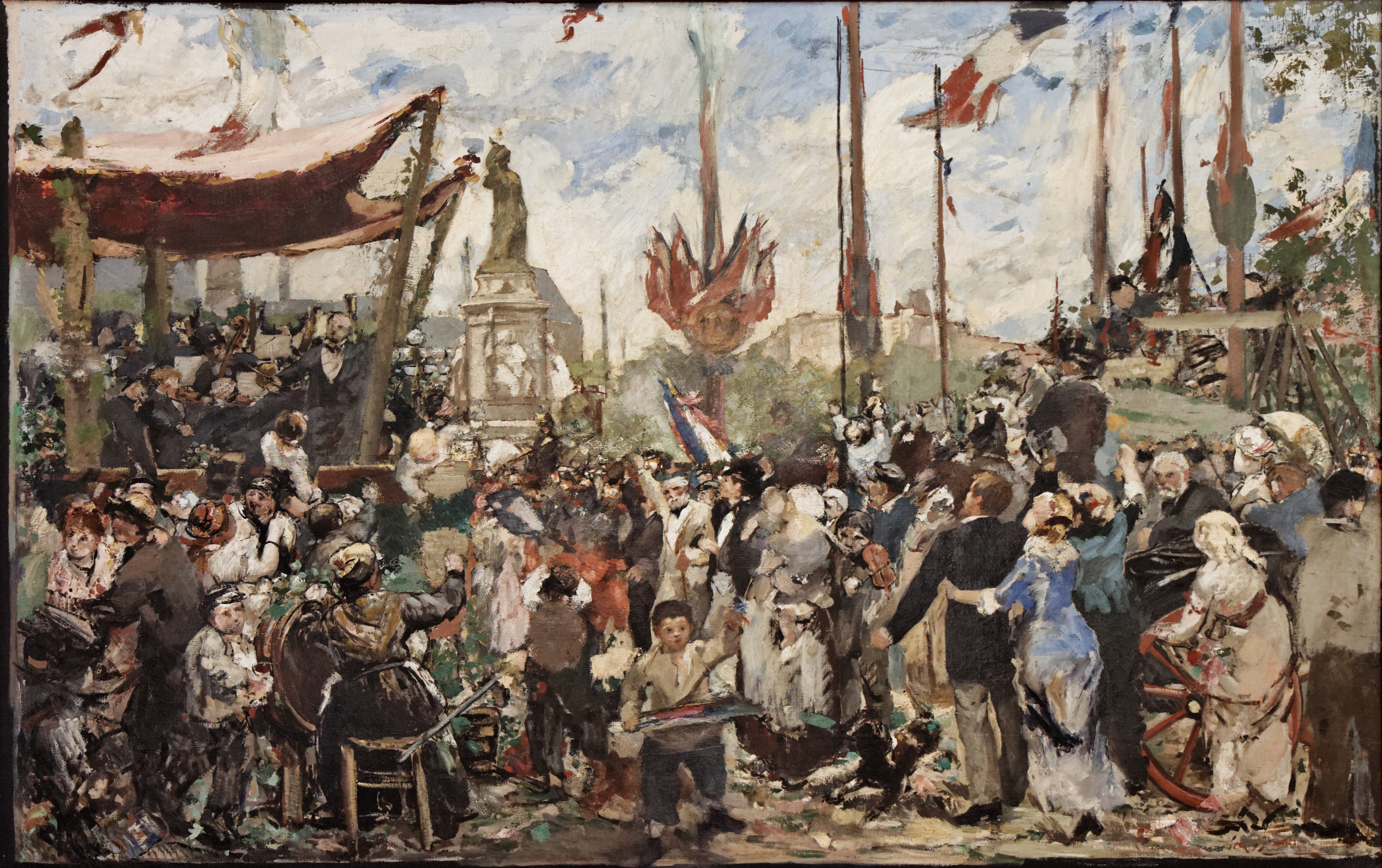 Le 14 juillet 1880, inauguration du monument à la République (vers 1882), esquisse d'Alfred Roll pour un tableau de 63m2 commémorant l'inauguration de la maquette en plâtre de la statue des frères Morice sur la place de la République à Paris. Conservé au Petit Palais à Paris (référence).